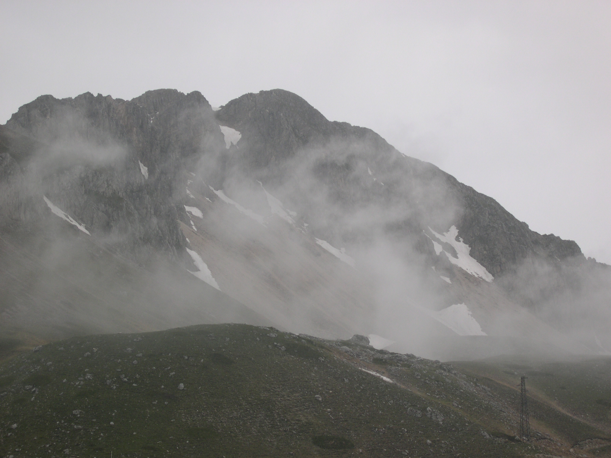 Monte Terminillo La vetta